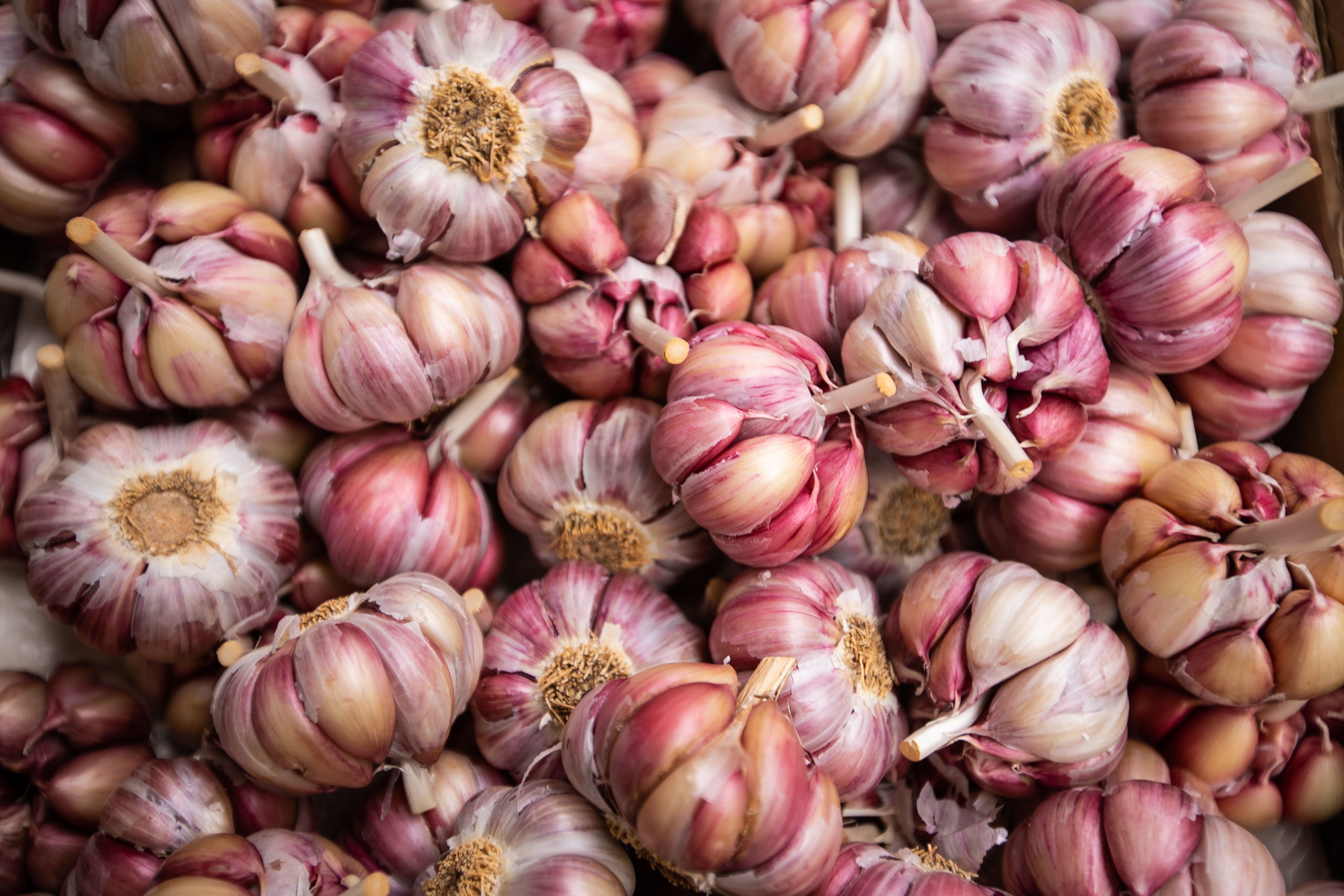 Produtos do Agro Paulista